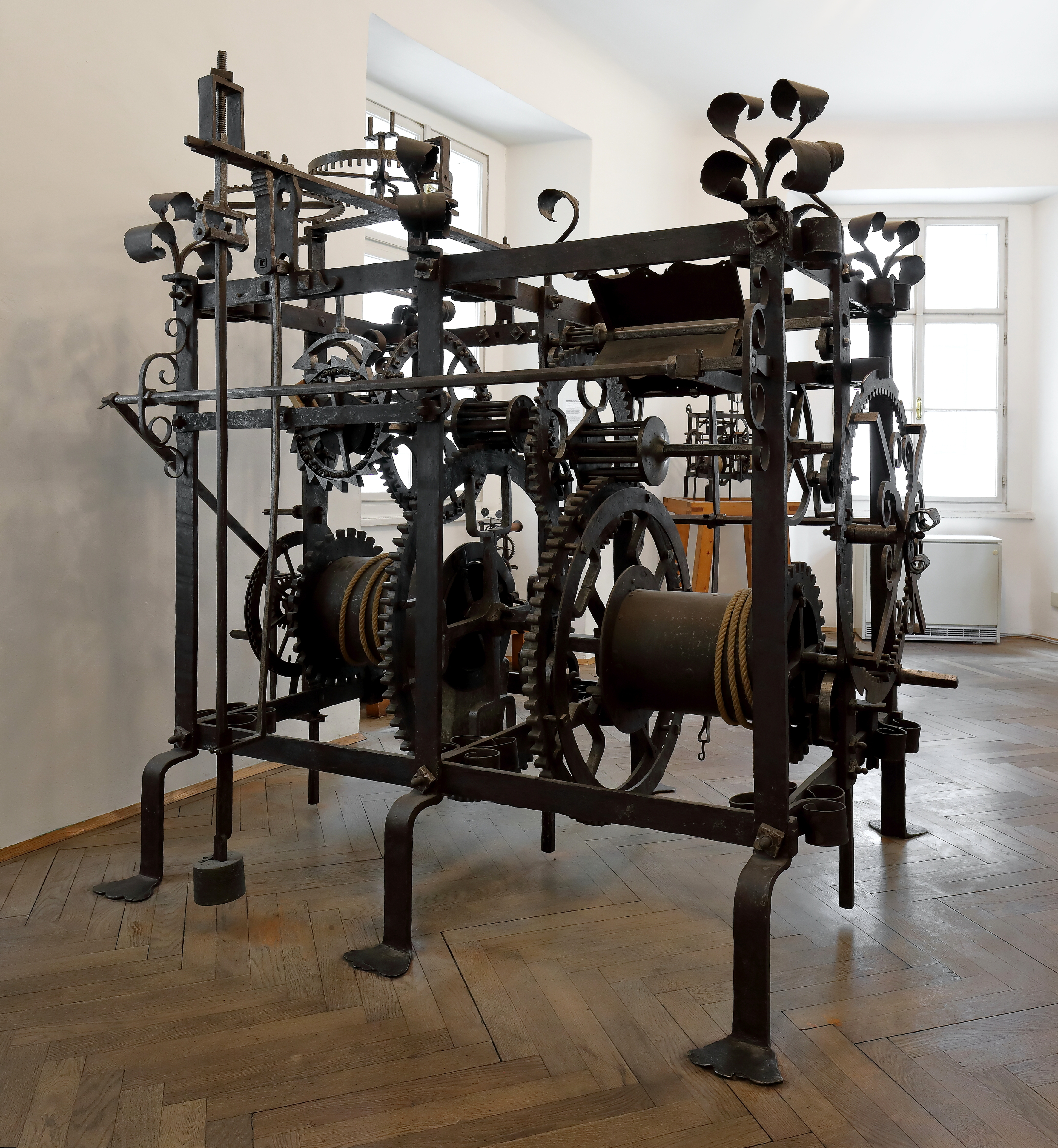 Die ehemalige Turmuhr des Stephandomes im Uhrenmuseum im 1. Wiener Gemeindebezirk Innere Stadt an der Adresse Schulhof 2. Die rund 700 Kg schwere Uhr wurde 1699 vom bürgerlichen Uhrmacher Joachim Oberkircher gefertigt und war im Südturm unter der Glockenstube mit 4 Zifferblättern installiert. Im Zuge der Turmrestaurierung 1861 wurde sie ersatzlos demontiert, kam später in den Besitz des Uhrenmuseums und wurde 2004 restauriert.